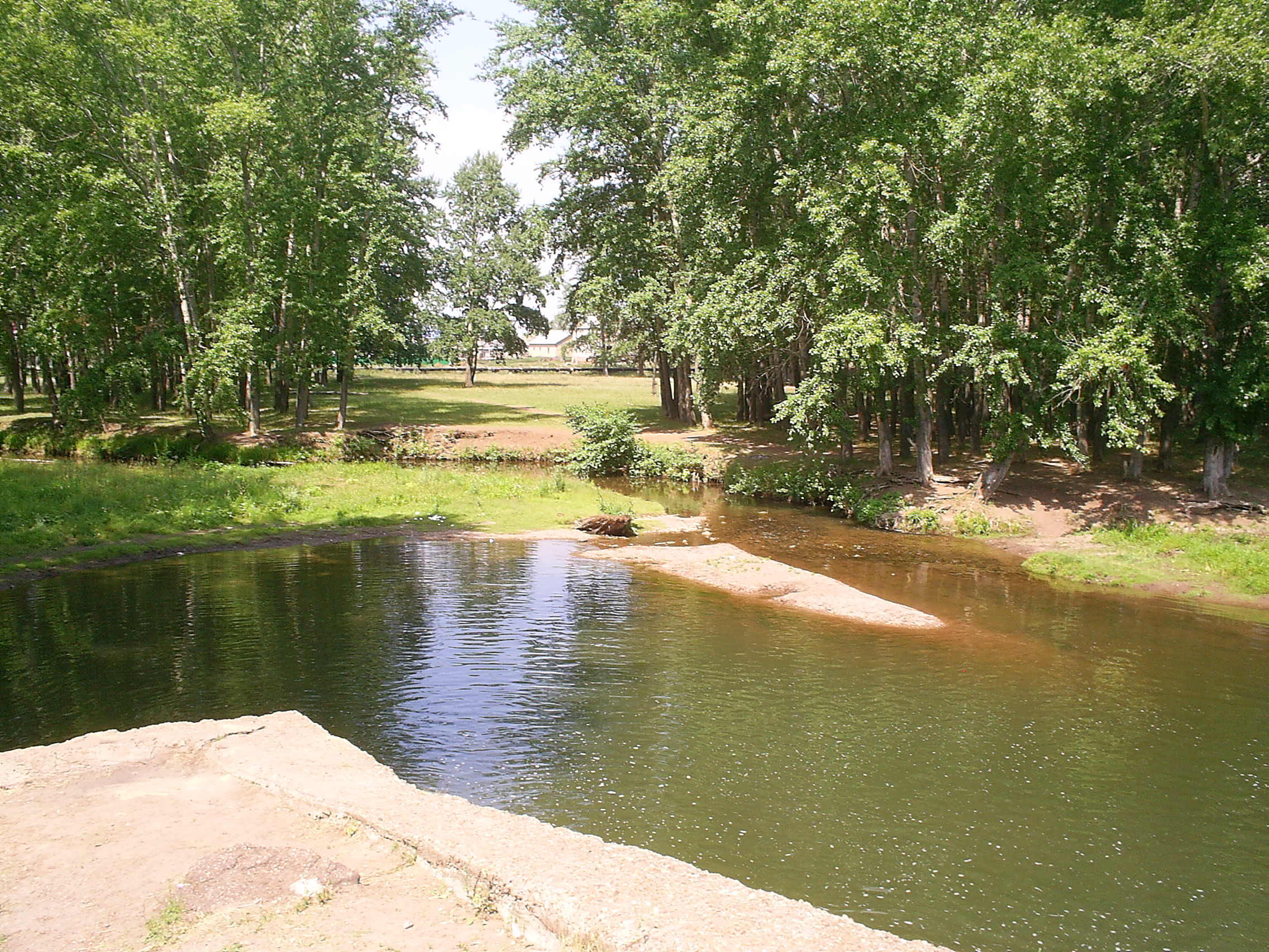 Река Тайрук в городе Ишимбае